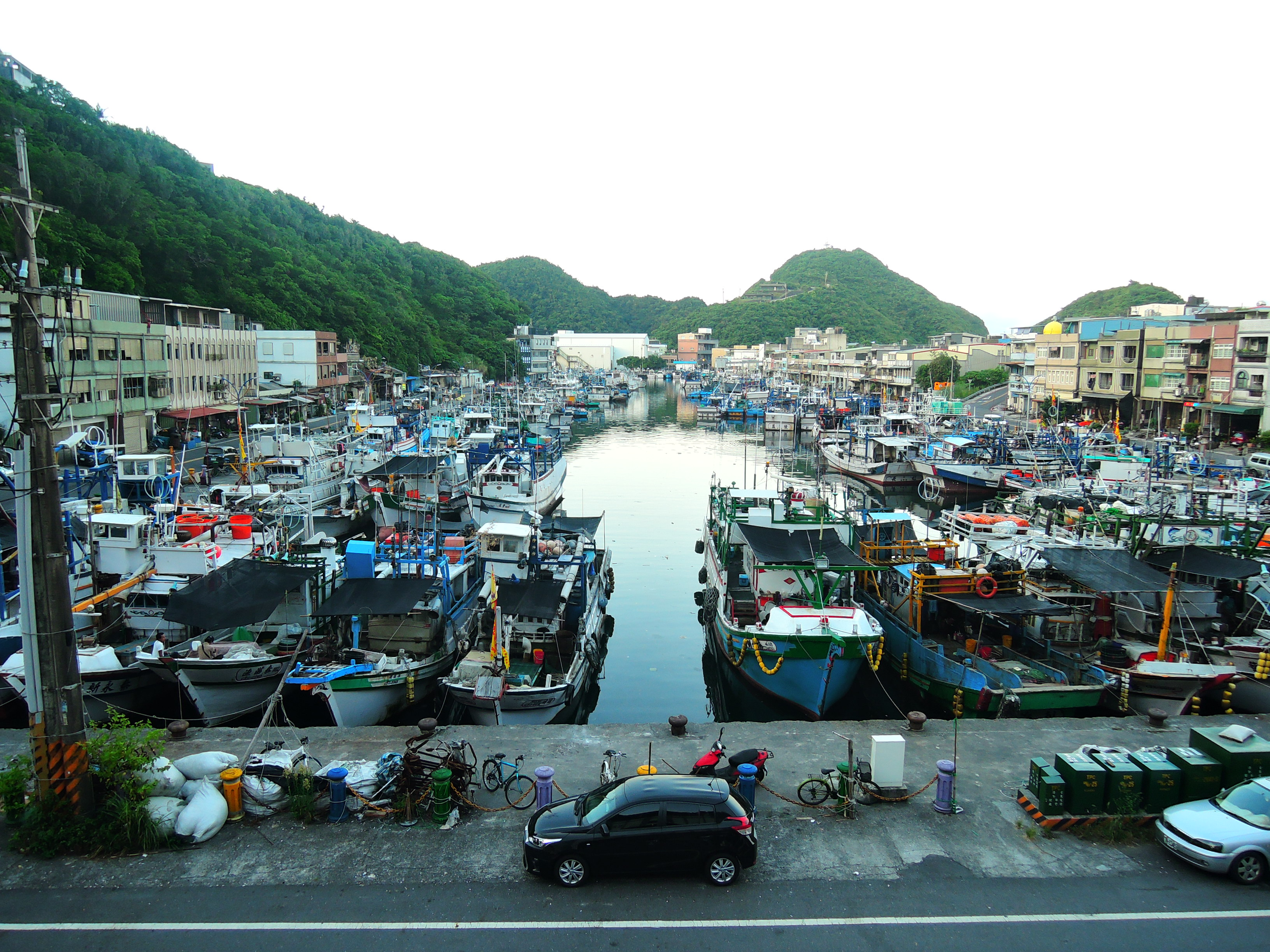 蘇澳鎮南方澳漁港